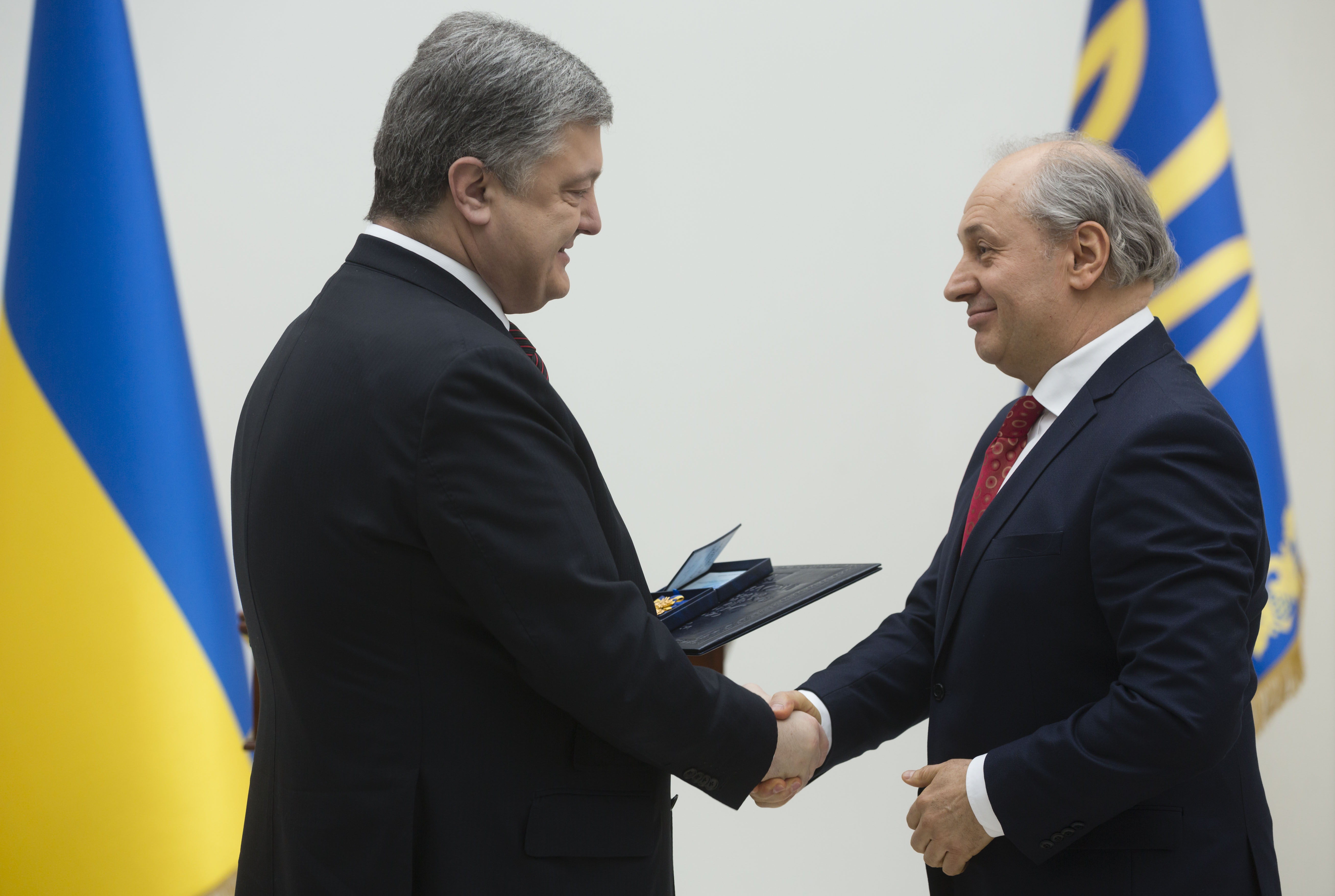 Іван Малкович на церемонії вручення Національної премії України імені Тараса Шевченка 2017 року.